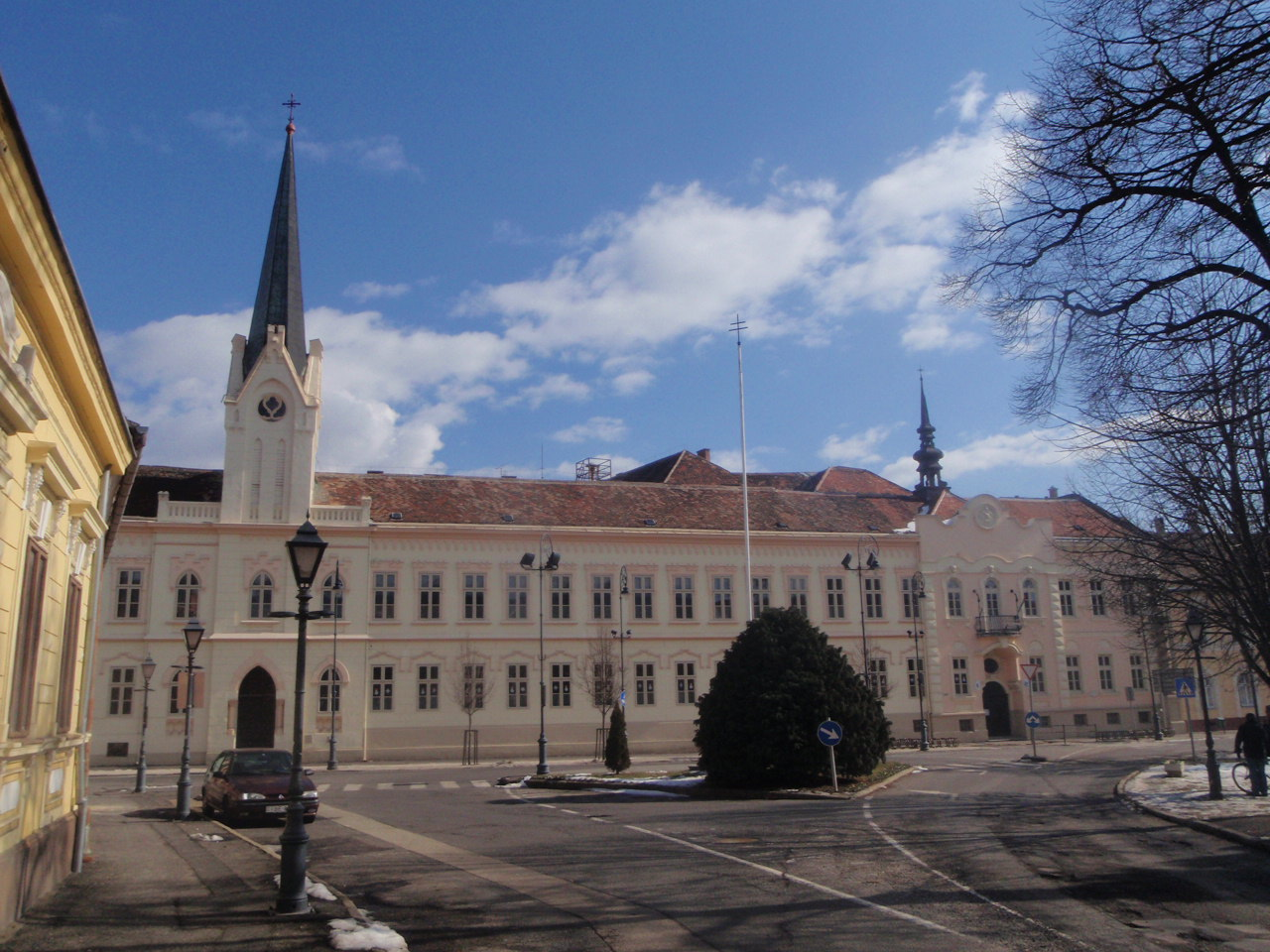 Katholische Volksschule in Várkör, Güns